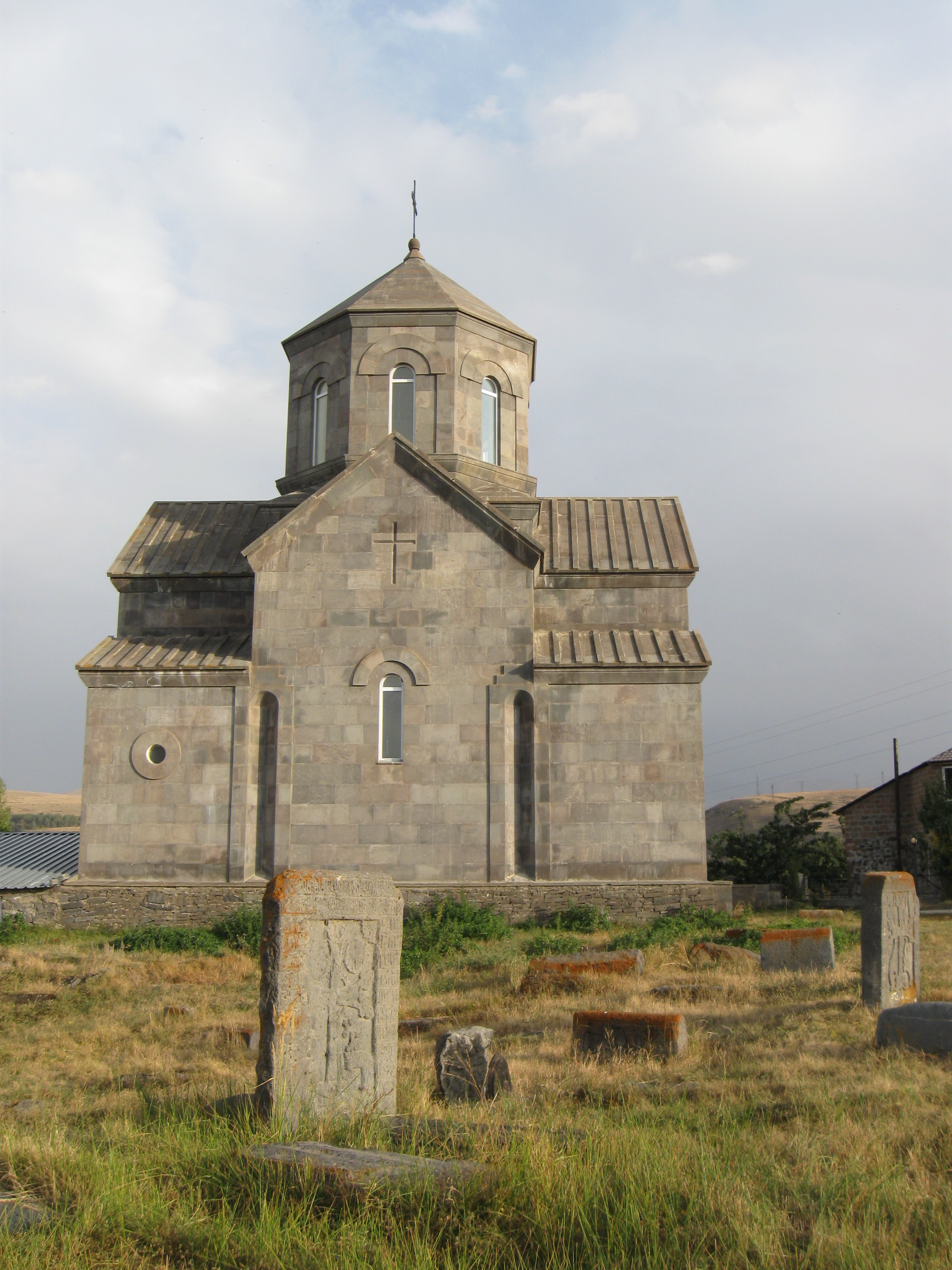 Եկեղեցի Սբ. Աստվածածին և հարակից գերեզմանոց ու խաչքարներ 85/18